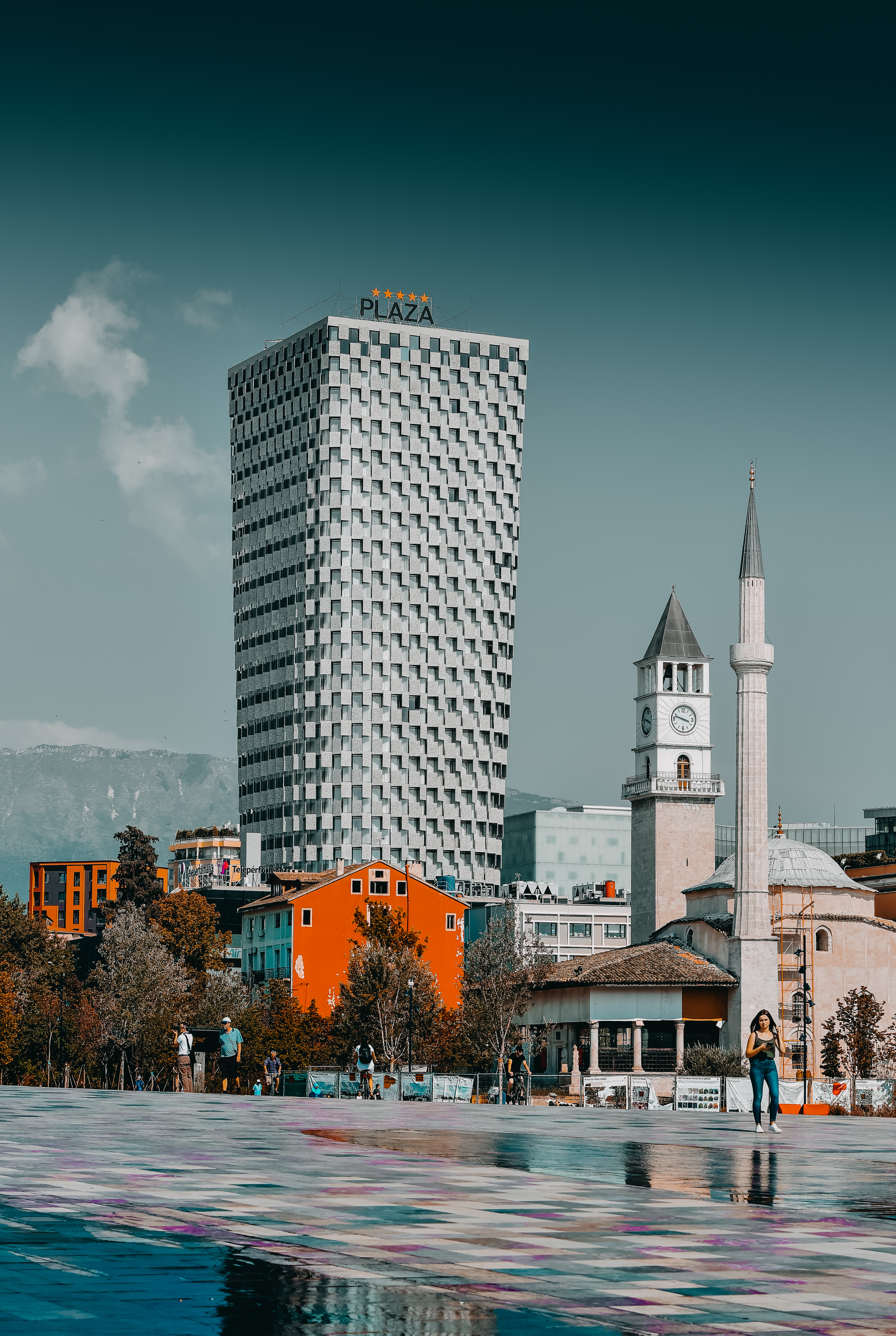 Xhamia e Ethem Beut